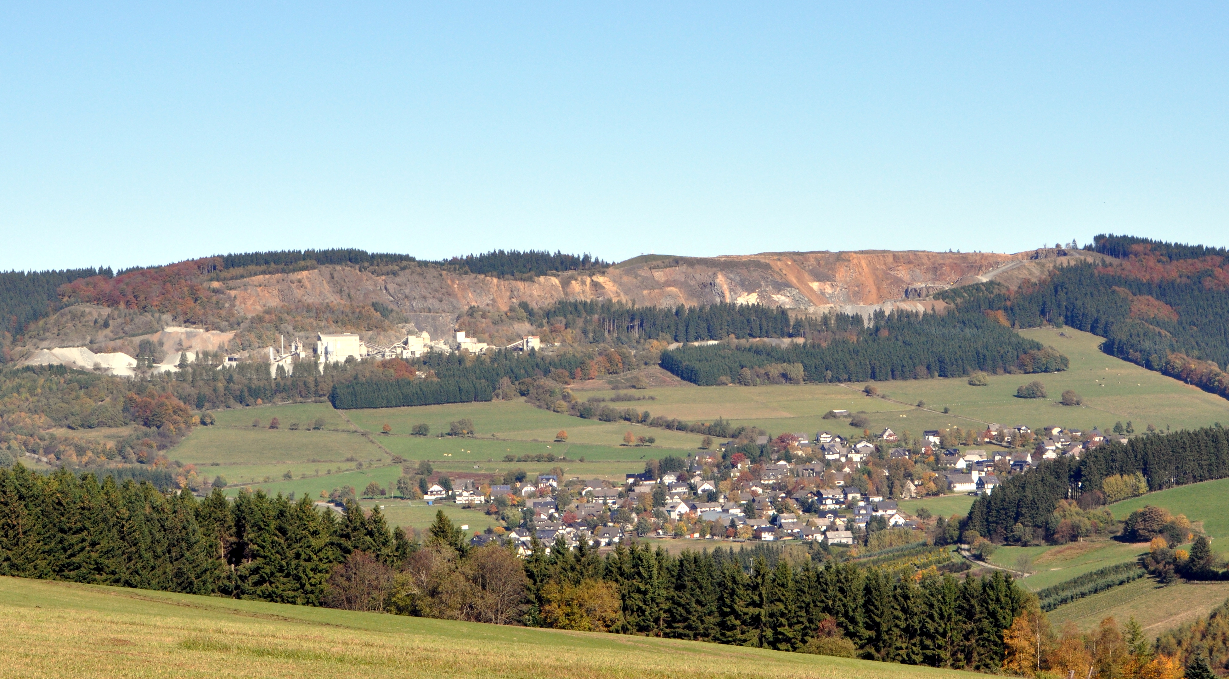 Panoramaansicht von Hildfeld, Hochsauerlandkreis mit dem Diabas-Steinbruch über dem Ort